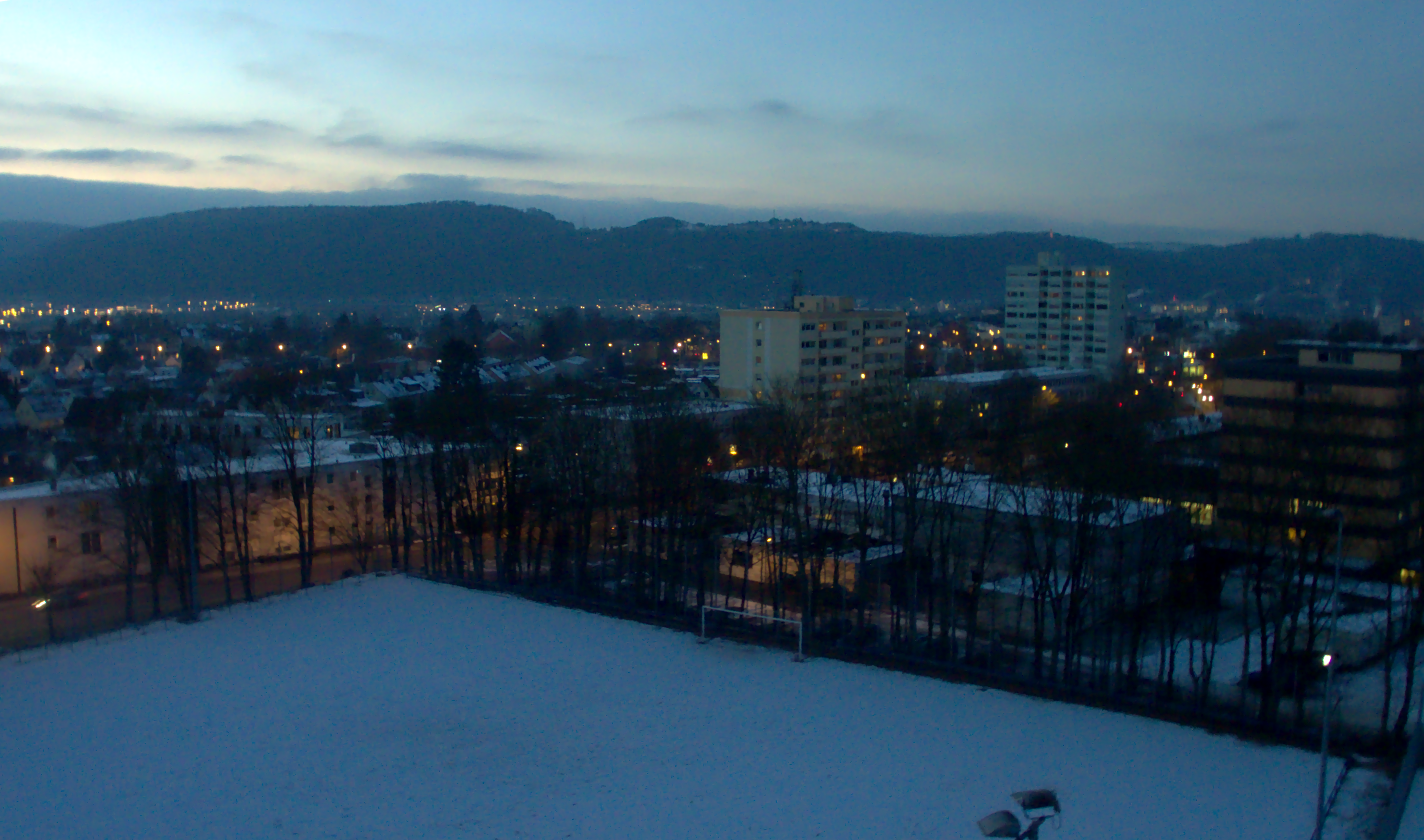 Trier-Heilig-Kreuz: Blick vom Sportplatz auf die Hochhäuser